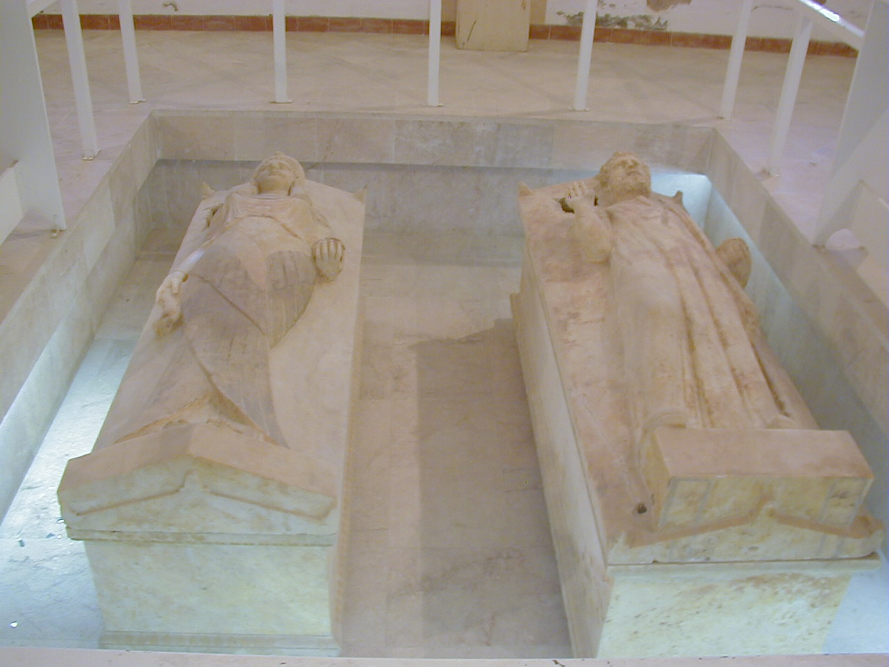 sarcophages, musée national de carthage (tunisie)